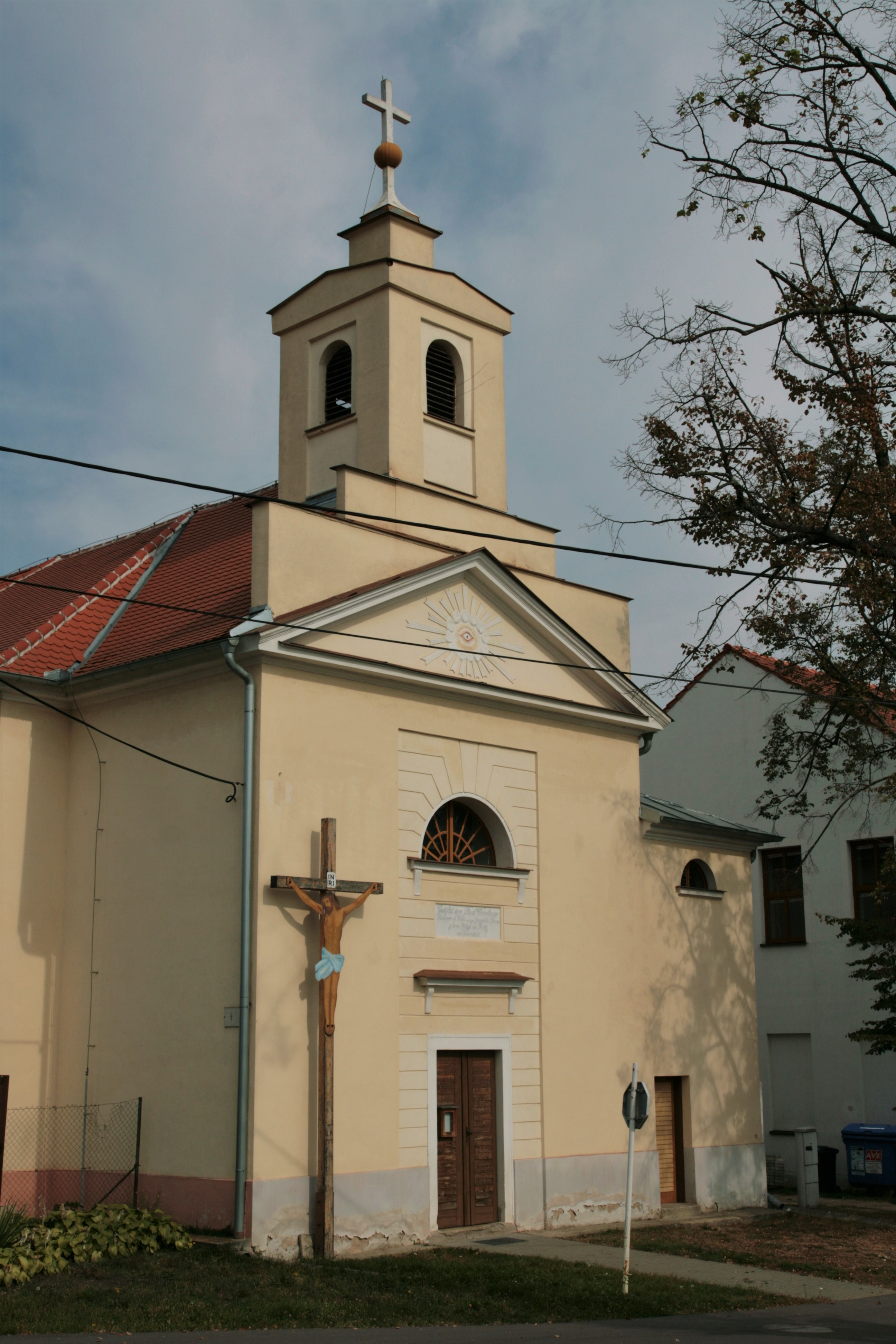 Obec Pravice v okrese Znojmo. Kostel Nejsvětější Trojice na křižovatce u obecního úřadu.